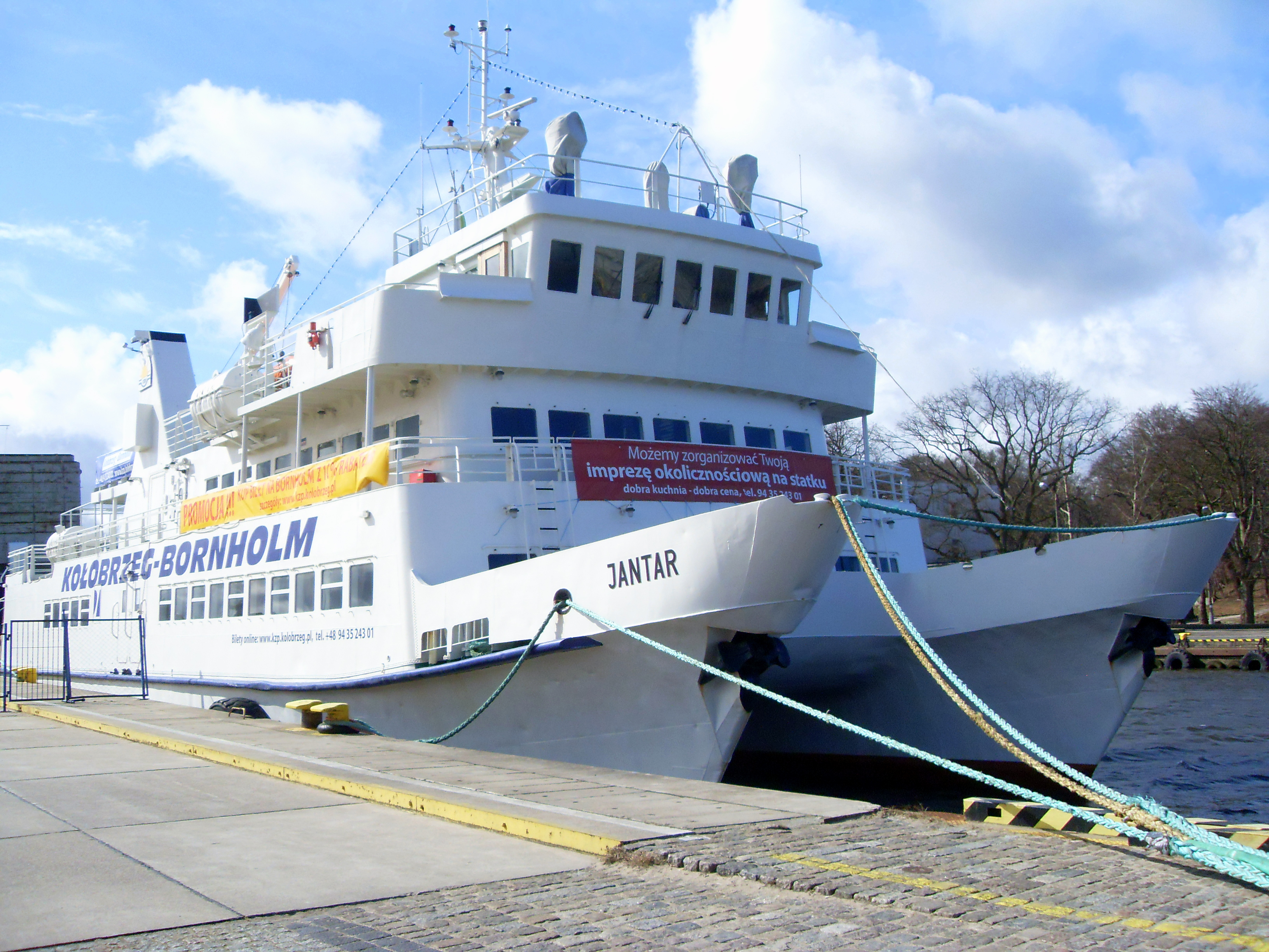 Katamaran pasażerski MS Jantar (dawniej LIIVI LAHT) w Kołobrzegu. IMO 8418708